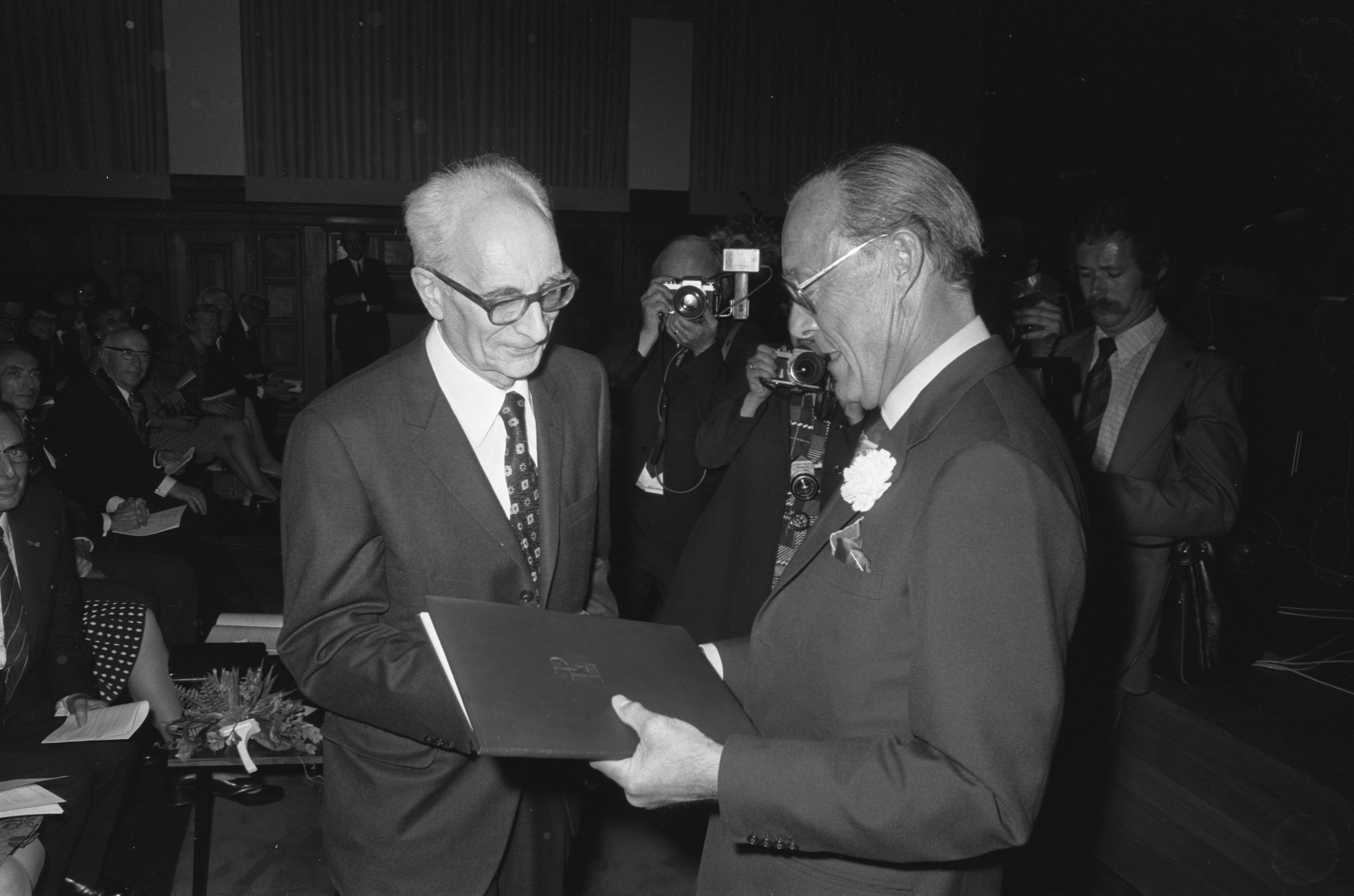 Collectie / Archief : Fotocollectie Anefo Reportage / Serie : [ onbekend ] Beschrijving : Prins Bernhard reikt Erasmusprijs uit aan prof. Claude Levi Strauss in Tropenmuseum in Amsterdam Datum : 28 mei 1973 Locatie : Amsterdam, Noord-Holland Trefwoorden : prijsuitreikingen, prinsen Persoonsnaam : Bernhard, prins, Lévi-Strauss, Claude Instellingsnaam : Tropenmuseum Fotograaf : Verhoeff, Bert / Anefo Auteursrechthebbende : Nationaal Archief Materiaalsoort : Negatief (zwart/wit) Nummer archiefinventaris : bekijk toegang 2.24.01.05 Bestanddeelnummer : 926-4410